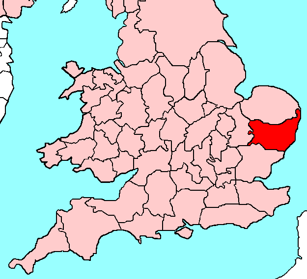 Suffolk